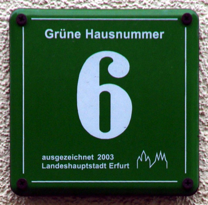 Eine Grüne Hausnummer, vergeben von der Stadt Erfurt und dem Verein "BürgerWerkStadtErfurt e. V.", als Qualitätssiegel für nachhaltiges Bauen.